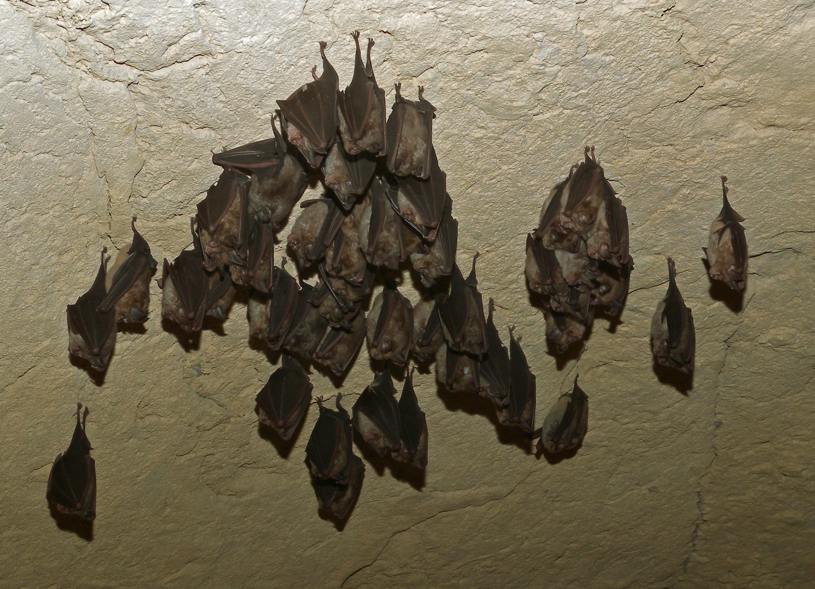 Saguzar kolonia bat Atxurrako beheko solairuan.